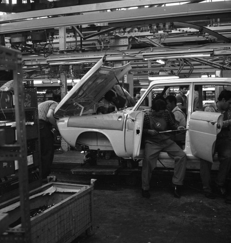 Autowerk BMW-München Halle 17, 1. Stock Bodenband für 1800 + 2000 Modell Bodenband zum Einbau der Innenausrüstung; Türschlösser werden angebracht und Scheinwerfer.